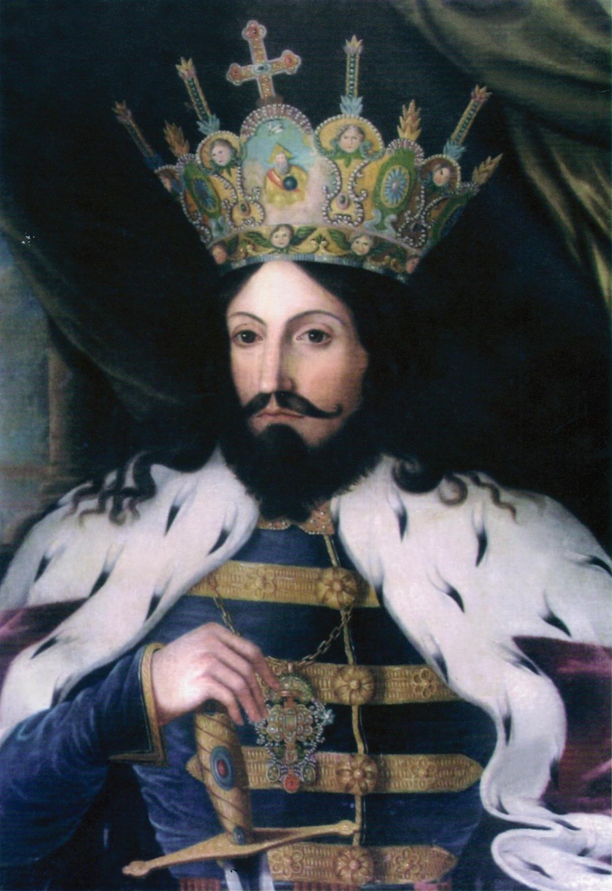 Stefan cel Mare